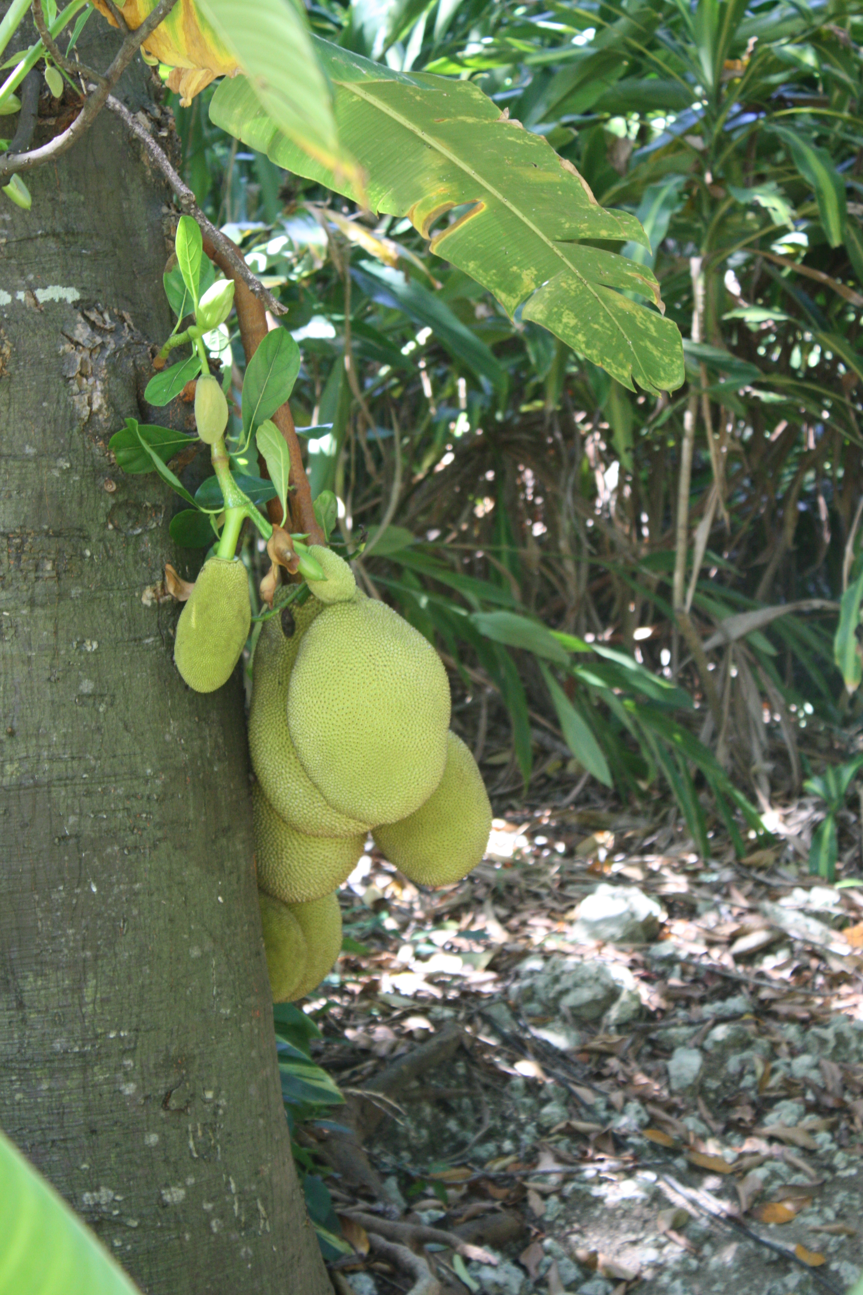 Jackfruit (Artocarpus heterophyllus). Andromeda Botanical Gardens, Barbados.